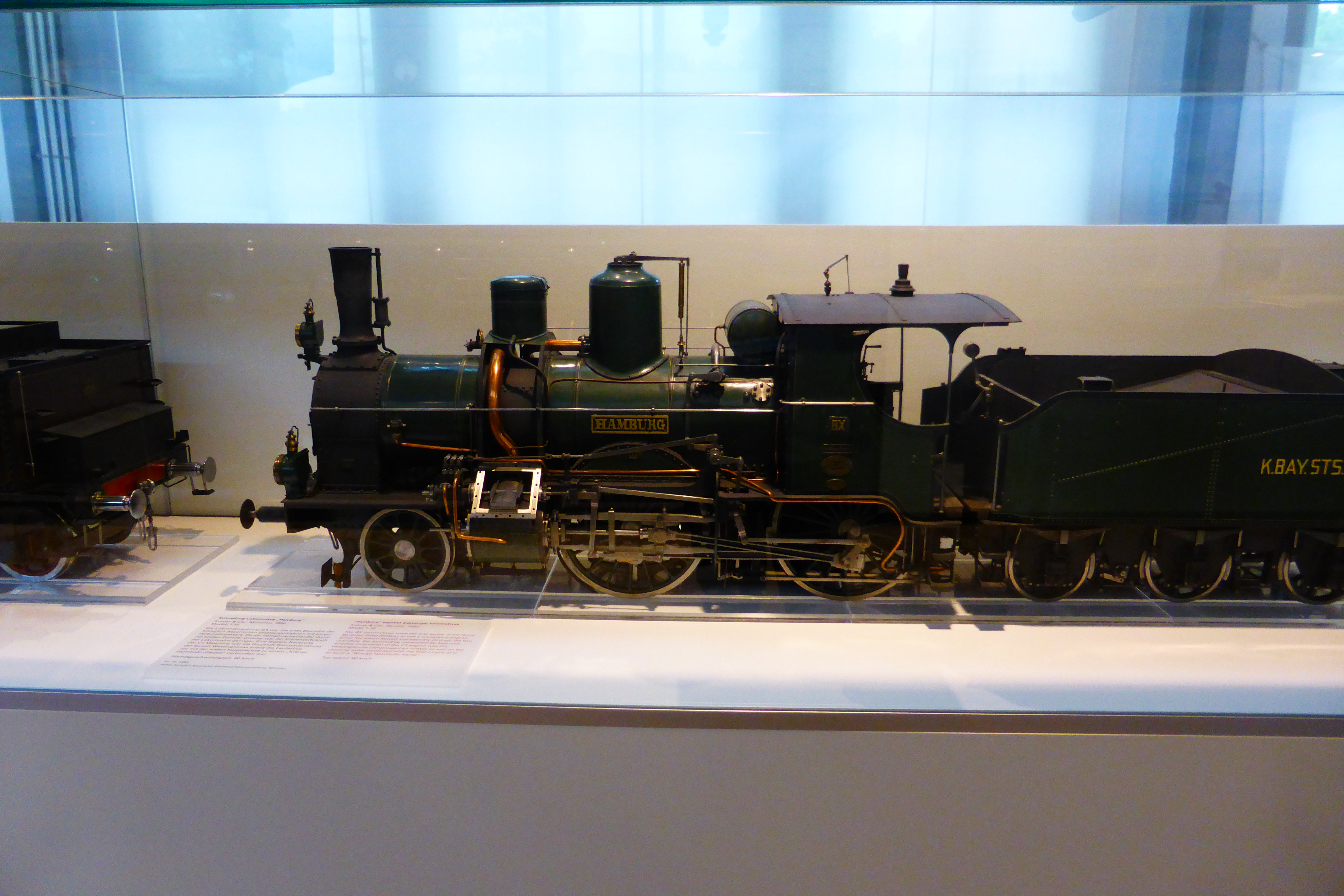 Modell der Bayerischen B X 941 Hamburg im Verkehrszentrum München